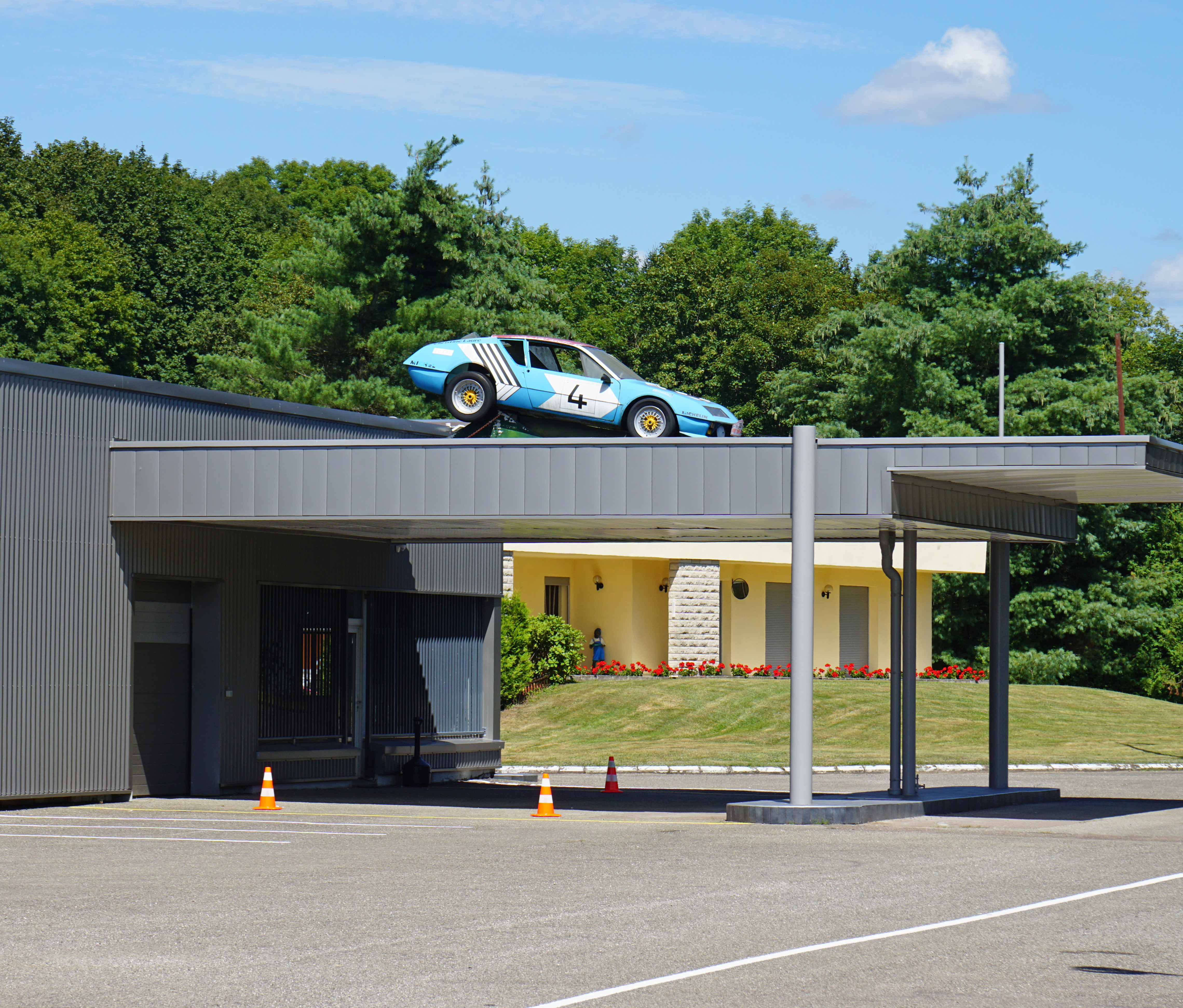 Ancien garage Jacques Henry à Roye (Haute-Saône), en direction de La Côte, avec une Alpine A310.